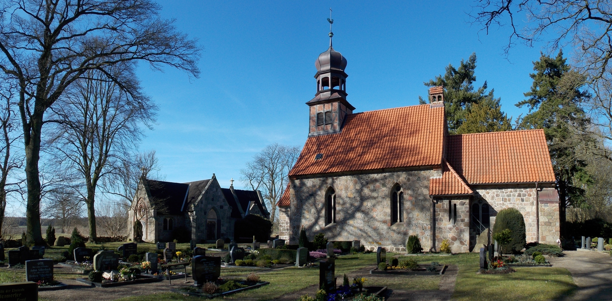 Gesamtansicht Feldsteinkirche Marsow mit Grabkapelle von Bülow